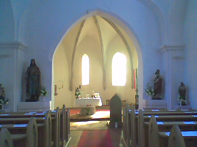 A tiszasülyi Szent László-templom